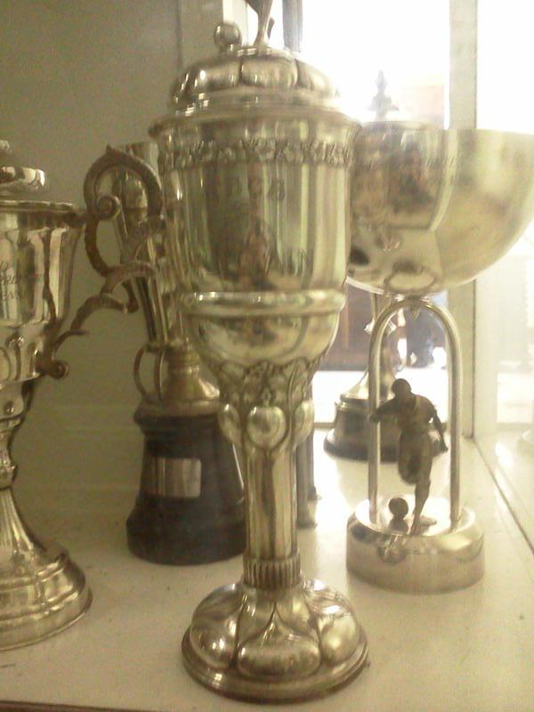 Foto da Taça Vulcain, conquistada pelo Fluminense em 1928.